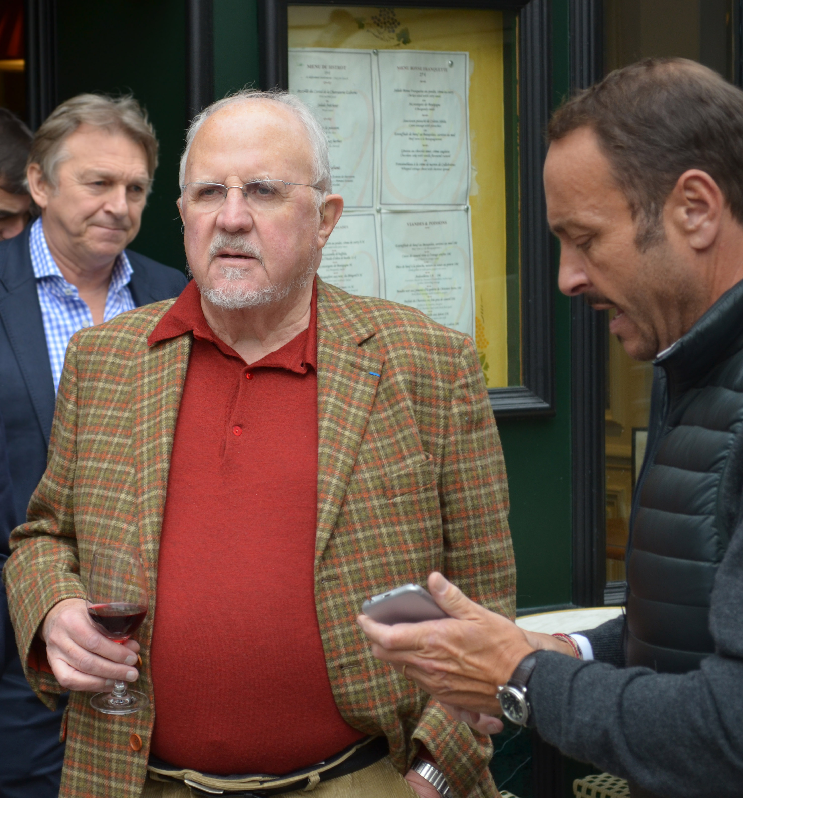 Michel Piot à la sortie d'une dégustation du jury de l'AAAAA, à Montmarte (La Bonne Franquette).